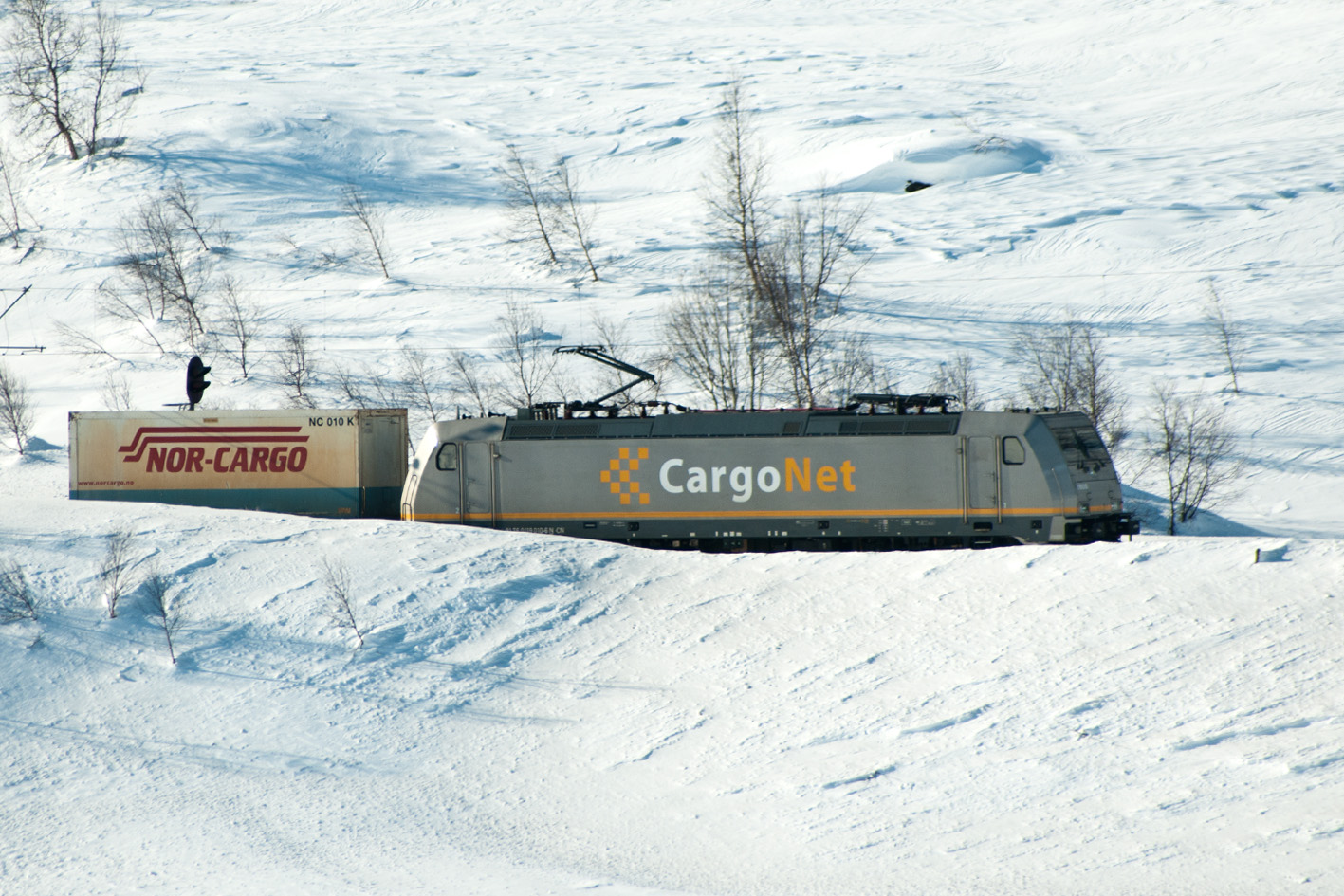 CE119 like ved Upsete stasjon.